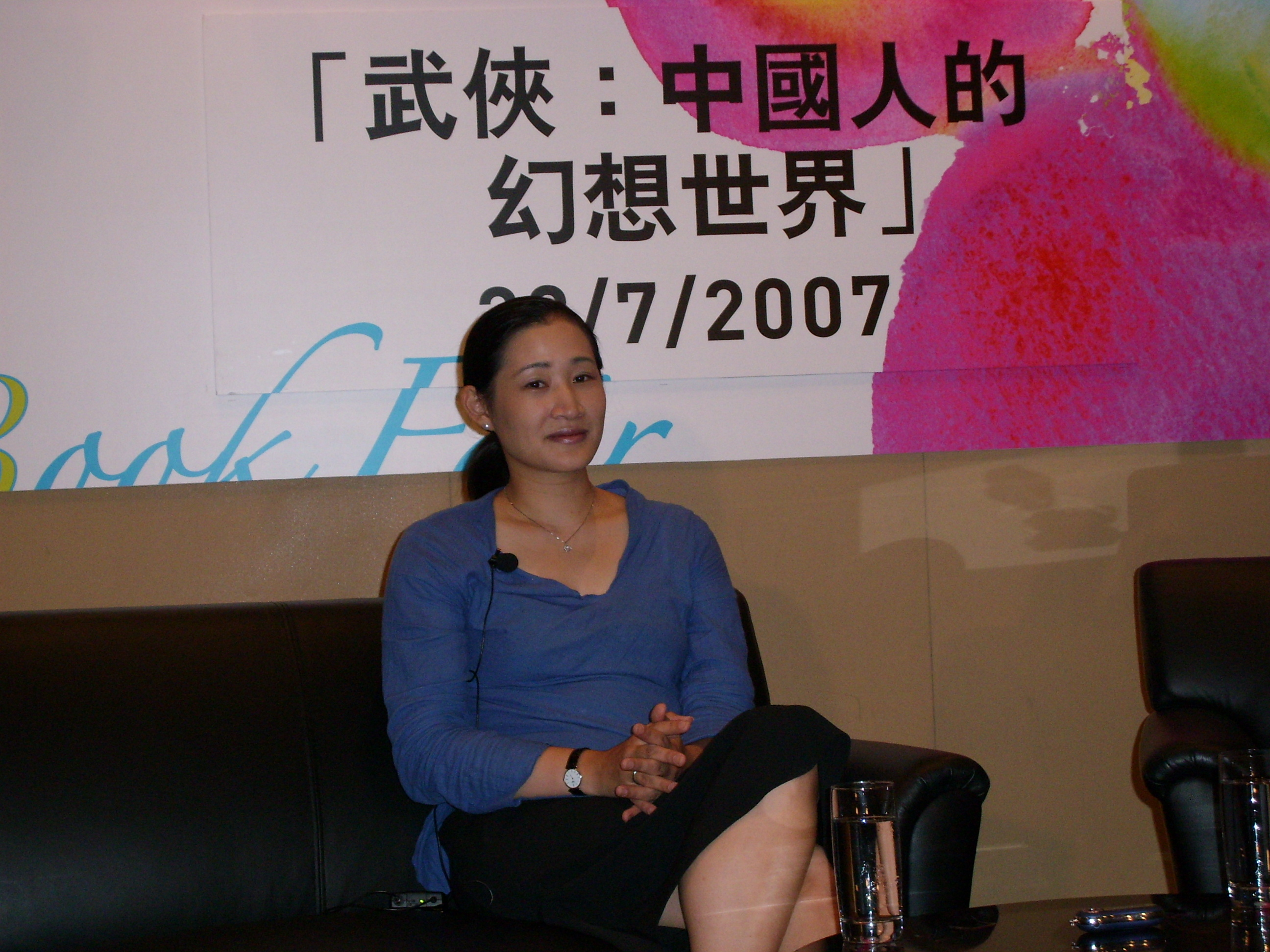 Zheng Feng (鄭丰) in Hong Kong Book Fair (香港書展) 2007